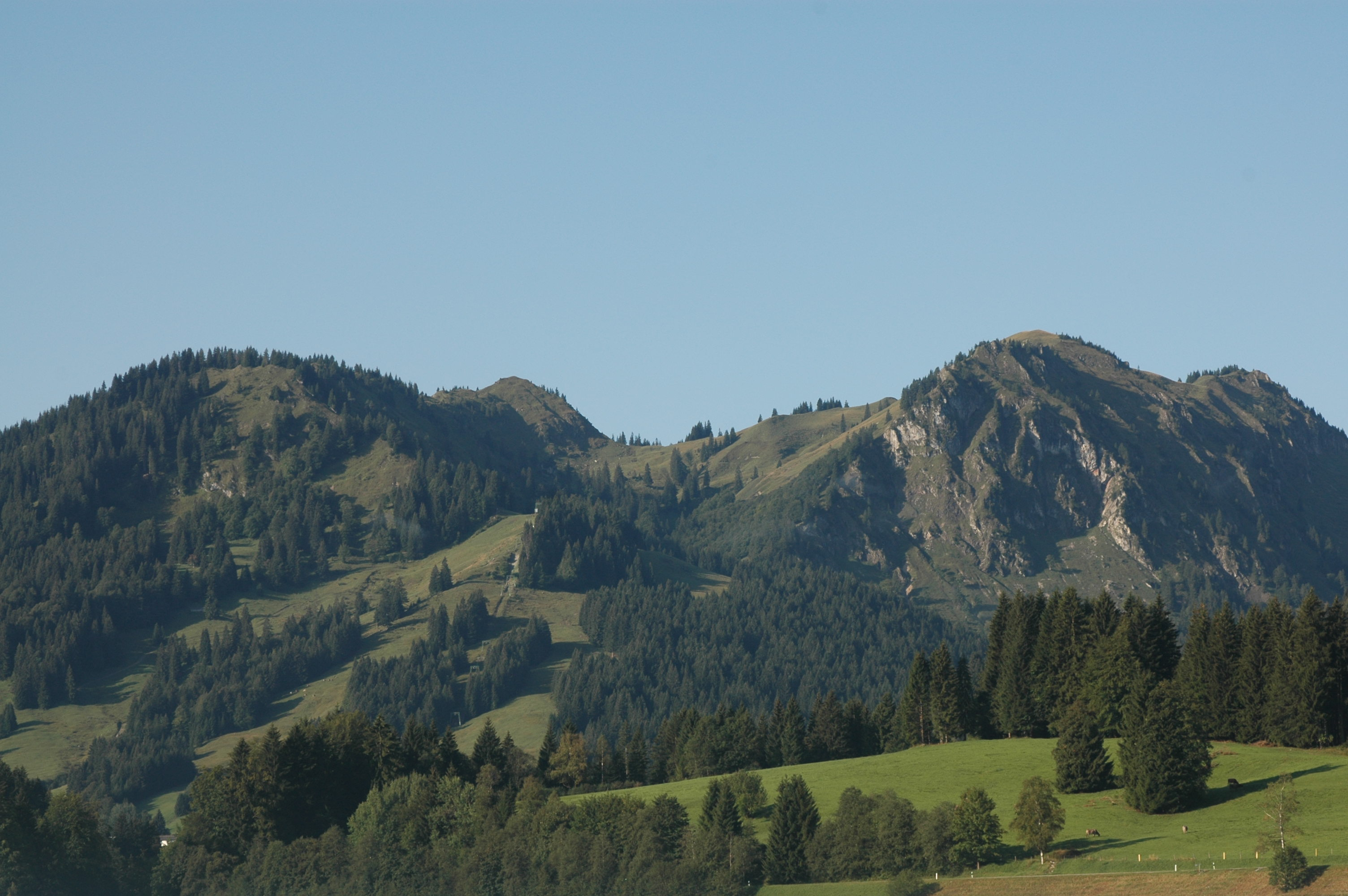 Spiesergruppe (Jochschrofen, Ornach, Rossberg, Spieser) von Unterjoch aus